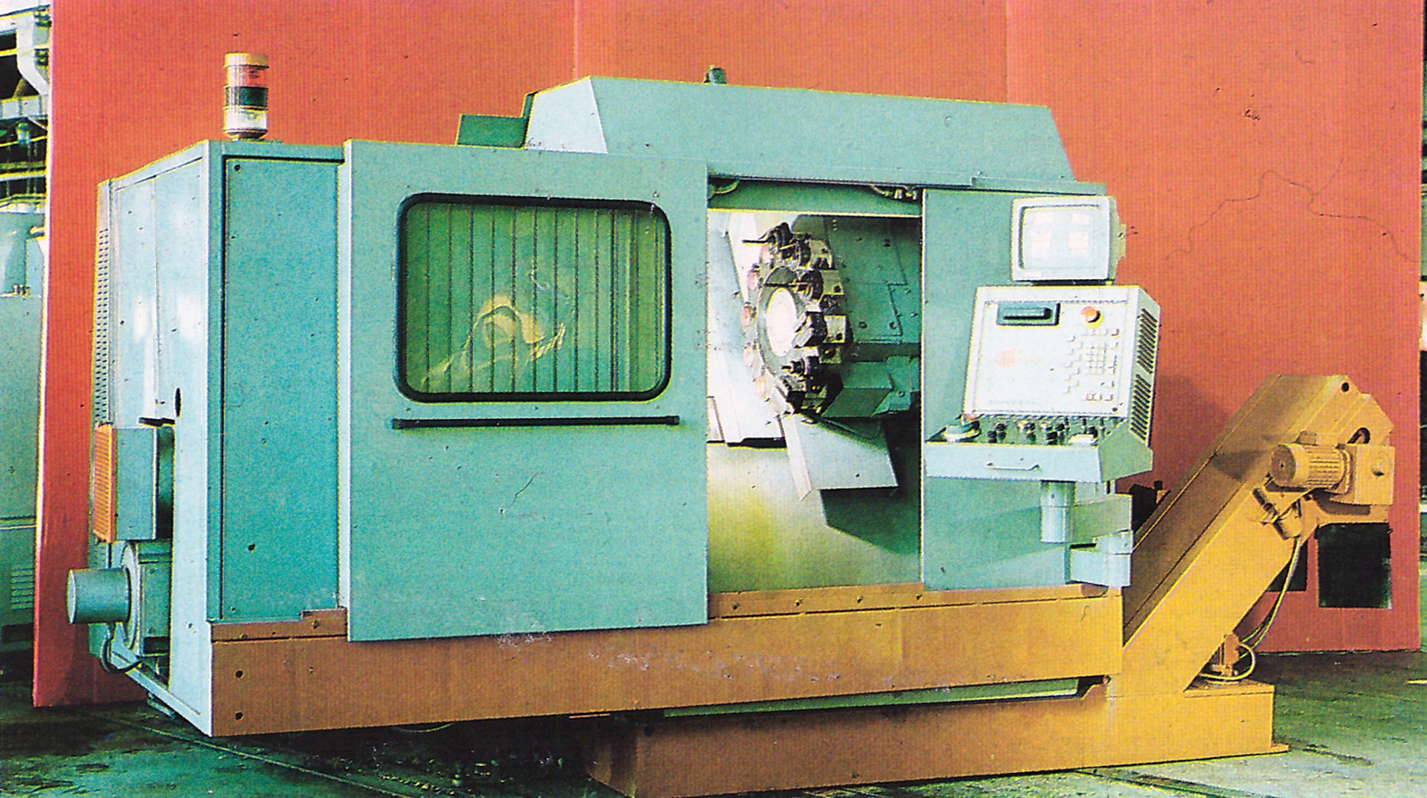 Верстат, який виготовляли на ПрАТ "Фірма "БЕВЕРС".